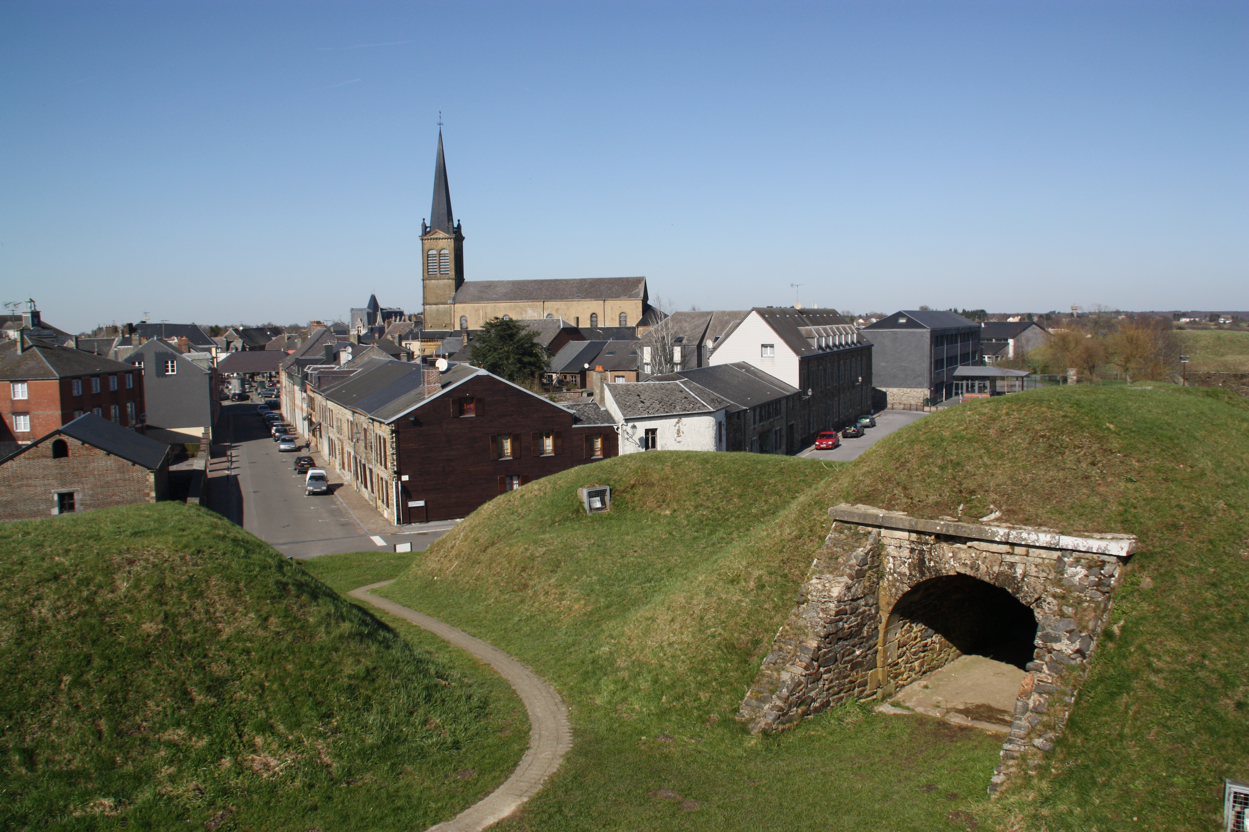 Une vue du point le plus haut des remparts de Rocroi This building is en partie classé, en partie inscrit au titre des Monuments Historiques. .